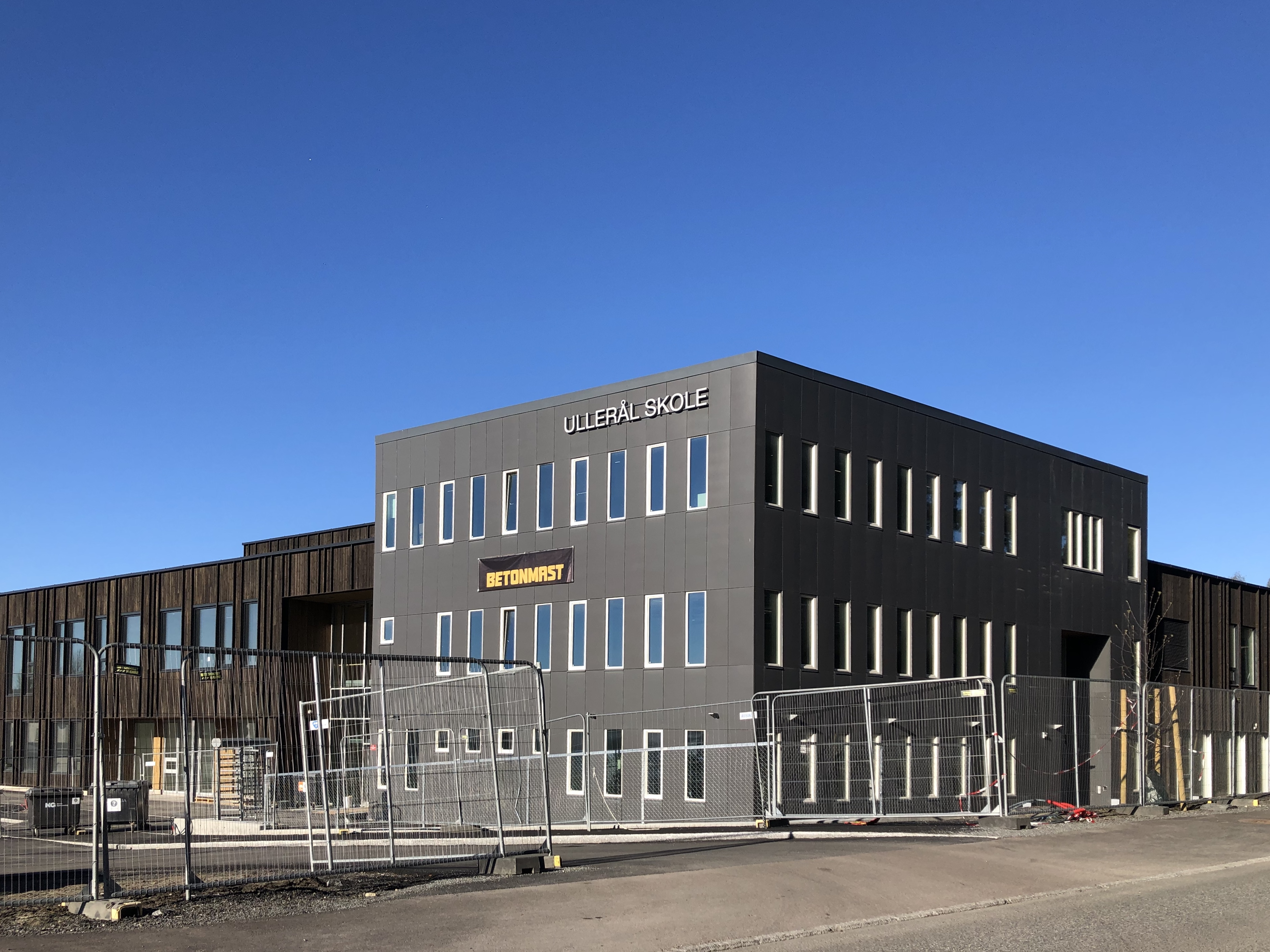 Ullerål skole, nybygging, 2020